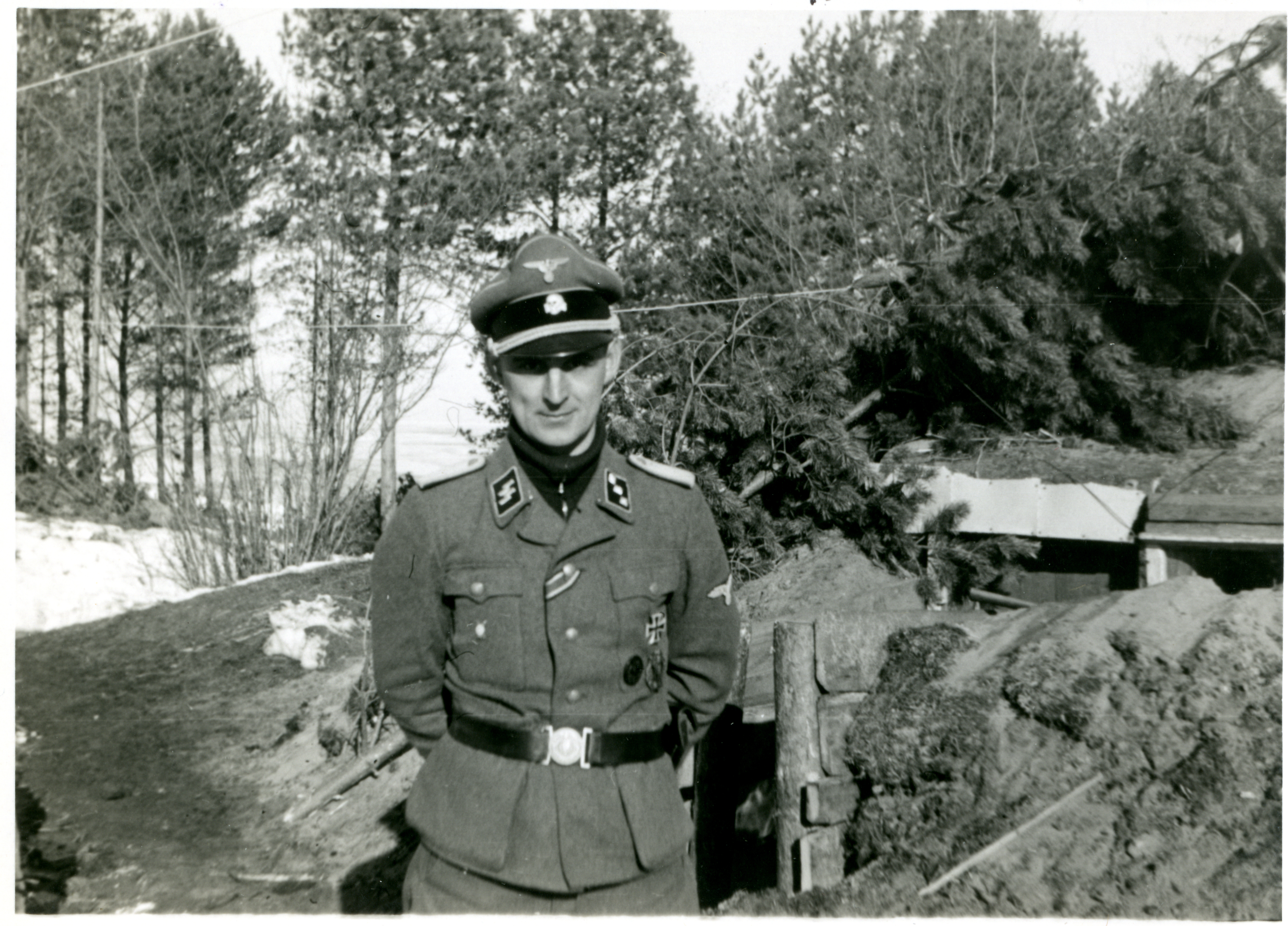 Bildet er hentet fra Arkivverket. Den svenske offiseren Hans-Gösta Pehrsson ved Bunkerstrasse i nærheten av Narva. Foto fra Narvafronten, tilhørende landssviksak med domsnummer 2506, Oslo Politikammer. Arkivinstitusjon : Riksarkivet Arkivnavn : Landssvikarkivet Sted : Estland, Ukjent, Ukjent, Narva Emneord: Narvafronten, Menn, Soldater, Frontkjempere, Andre verdenskrig, 2. verdenskrig Avbildet